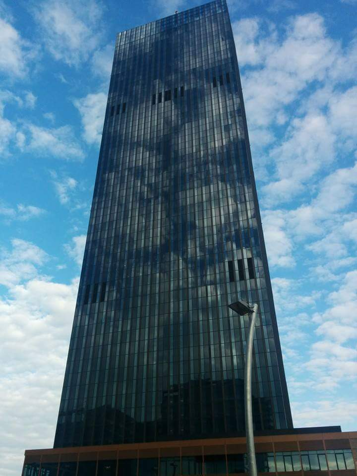 Spiegelung des Himmels in der Fassade des DC Towers